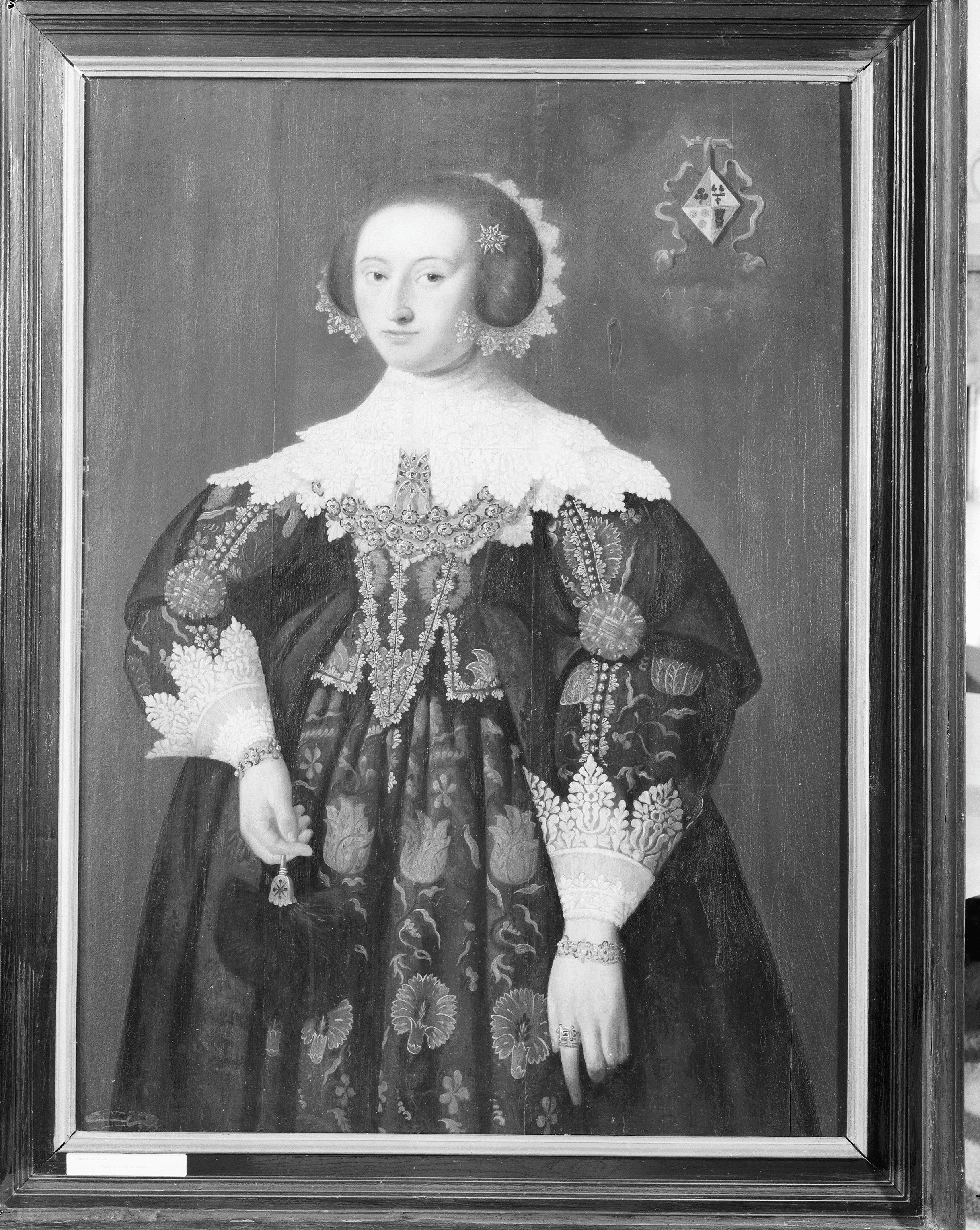 Crack-State: portret van Jeepke Lycklama 1635, (eigendom Ottema-Kingsma) stichting